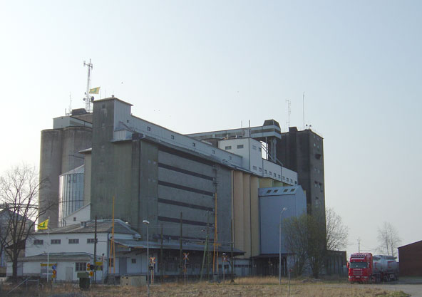 Foto på lagerhuset i Vara, tagen av mig själv. Den ursprungliga lagerbyggnadens (från 1918) exteriör utformad av Gunnar Asplund Källa:Silos - Modernismens agrara minnesmärken - Silobyggnader i Dalslands och Västergötlands slättbygder